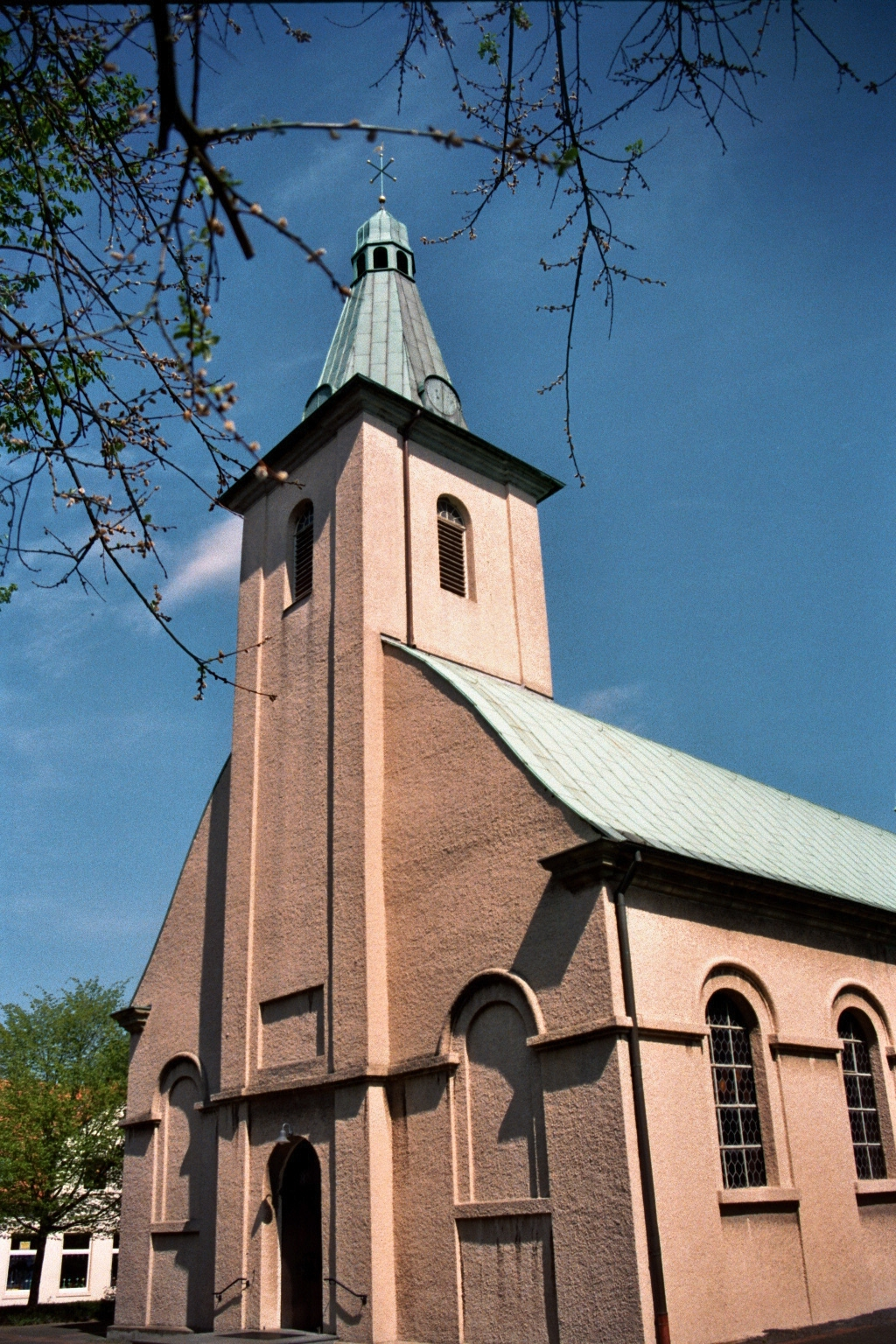 Turm der katholischen Kirche St. Peter und Paul Unna-Hemmerde, Kreis Unna, Nordrhein-Westfalen, Deutschland.